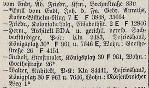 Familie vom Endt in Adressbuch der Stadt Düsseldorf, 1926, S. 161: Emil vom Endt, Kaufmann, Inhaber der Firma Anraths, Eigentümer Haus Kaiser-Wilhelm-Ring 7; dessen Sohn Friedrich (* 1893), Kolonialwarenhandlung, Eigentümer des Hauses Elisabethstraße 2; Hermann vom Endt, Architekt BDA, Eigentümer Defrieshaus (siehe Unternehmerfamilie Familie de Fries), Königsplatz 30 (Martin-Luther-Platz), Wohnung: Goethestraße 26; der Sohn Rudolf (Rudi), Kunstmaler, Königsplatz 30, Wohnung: Goethestraße 26, der Sohn Walter, Architekt, Defrieshaus, Wohnung Mörsenbroicher Weg 1